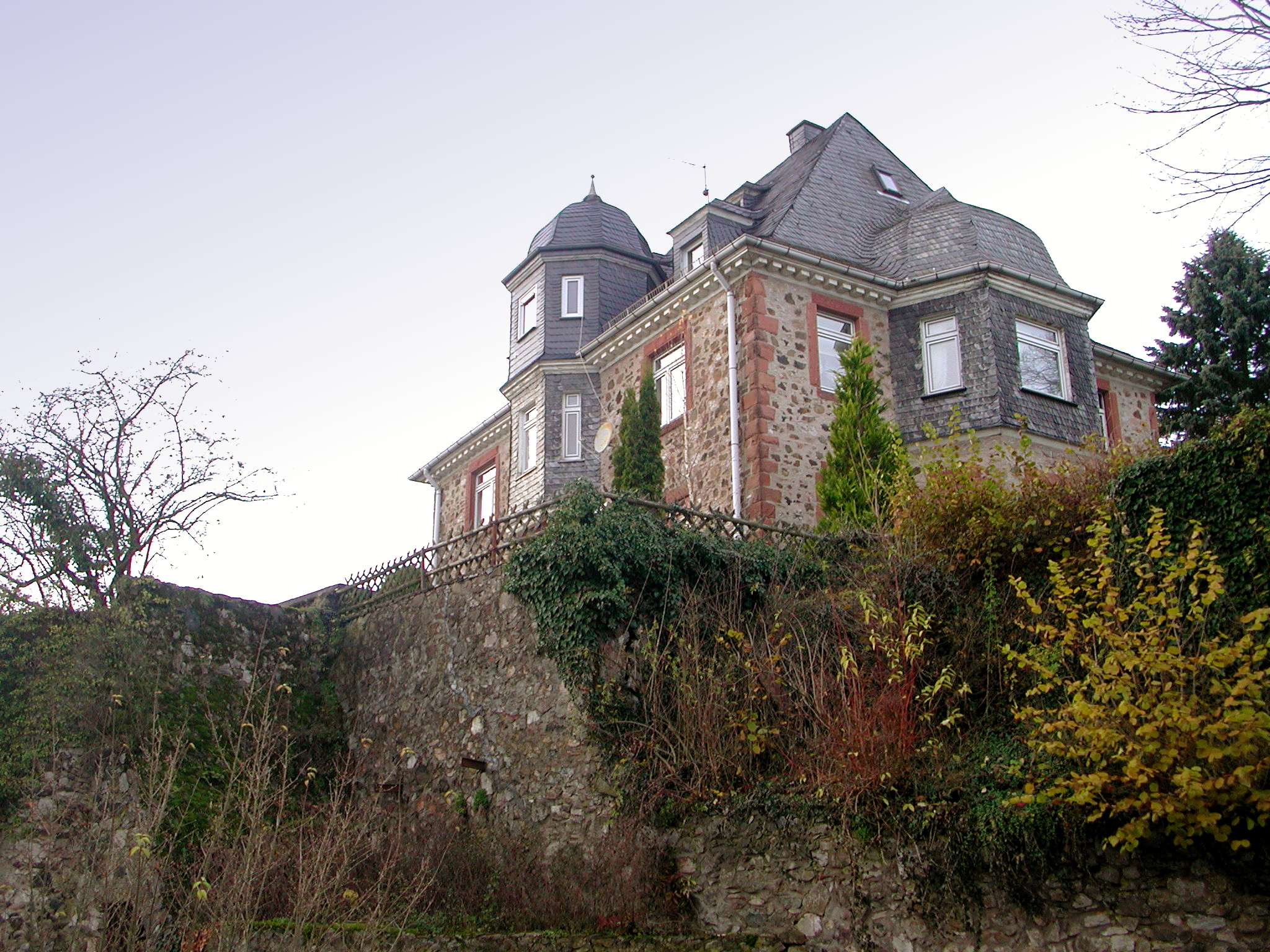 Biebertal-Königsberg im Kreis Gießen, Hessen, Deutschland. "Schloss"-Neubau auf den Grundmauern der ehemaligen Burg Königsberg.